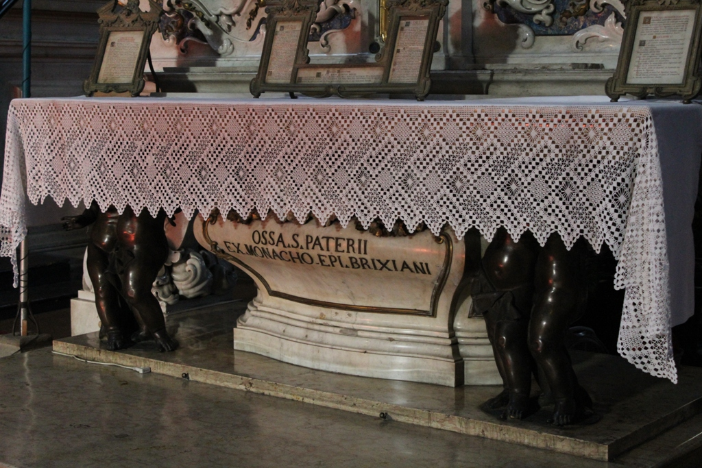 Reliquie di S. Paterio (Antonio Calegari) - Altare - Chiesa di S. Afra in S. Eufemia - Brescia